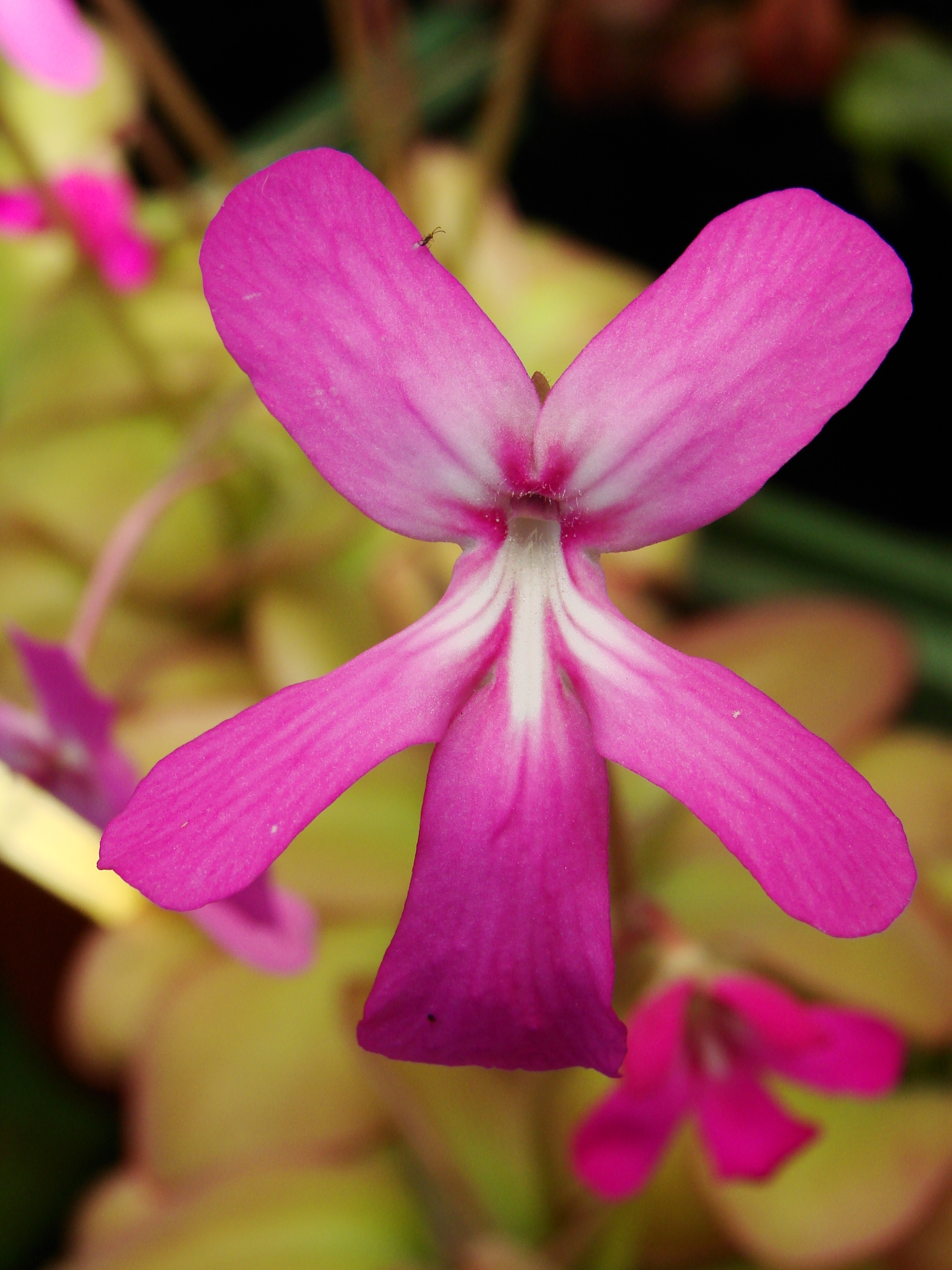 Jardin botanique de l'Université de Zurich (Suisse) : Pinguicula moranensis Kunth (1817)